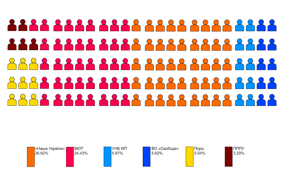 Розподіл депутатських мандатів у Львівській обласній раді за результатами виборів до Львівської обласної ради 2006 року